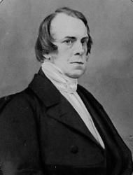 Heinrich Georg Bronn